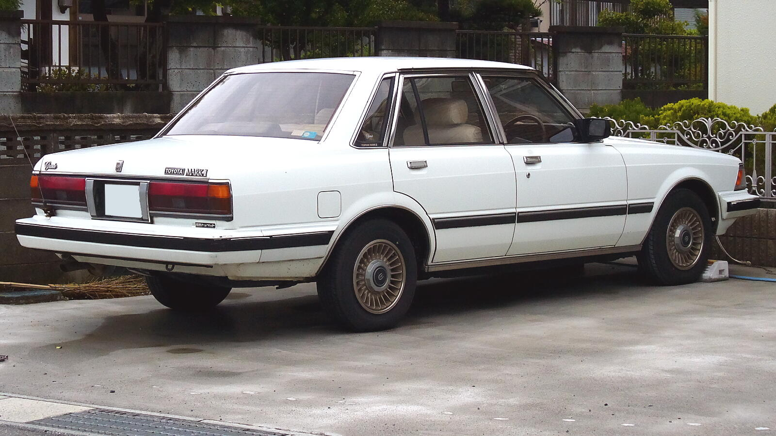 トヨタ・マークII（4代目セダン・リア）